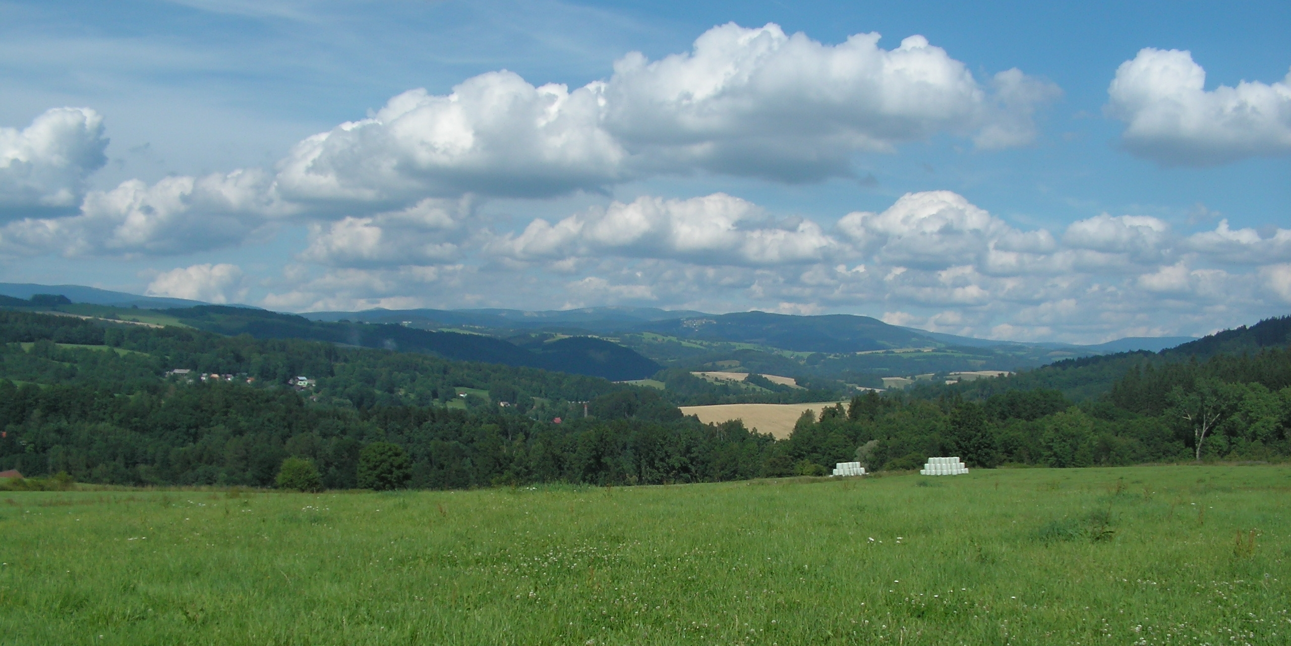 Panoráma Krkonoš při pohledu z Bystré nad Jizerou - vlevo Sněžka 1603 m, uprostřed Žalý 1034+1016 m, vpravo Černá hora 1299 m.